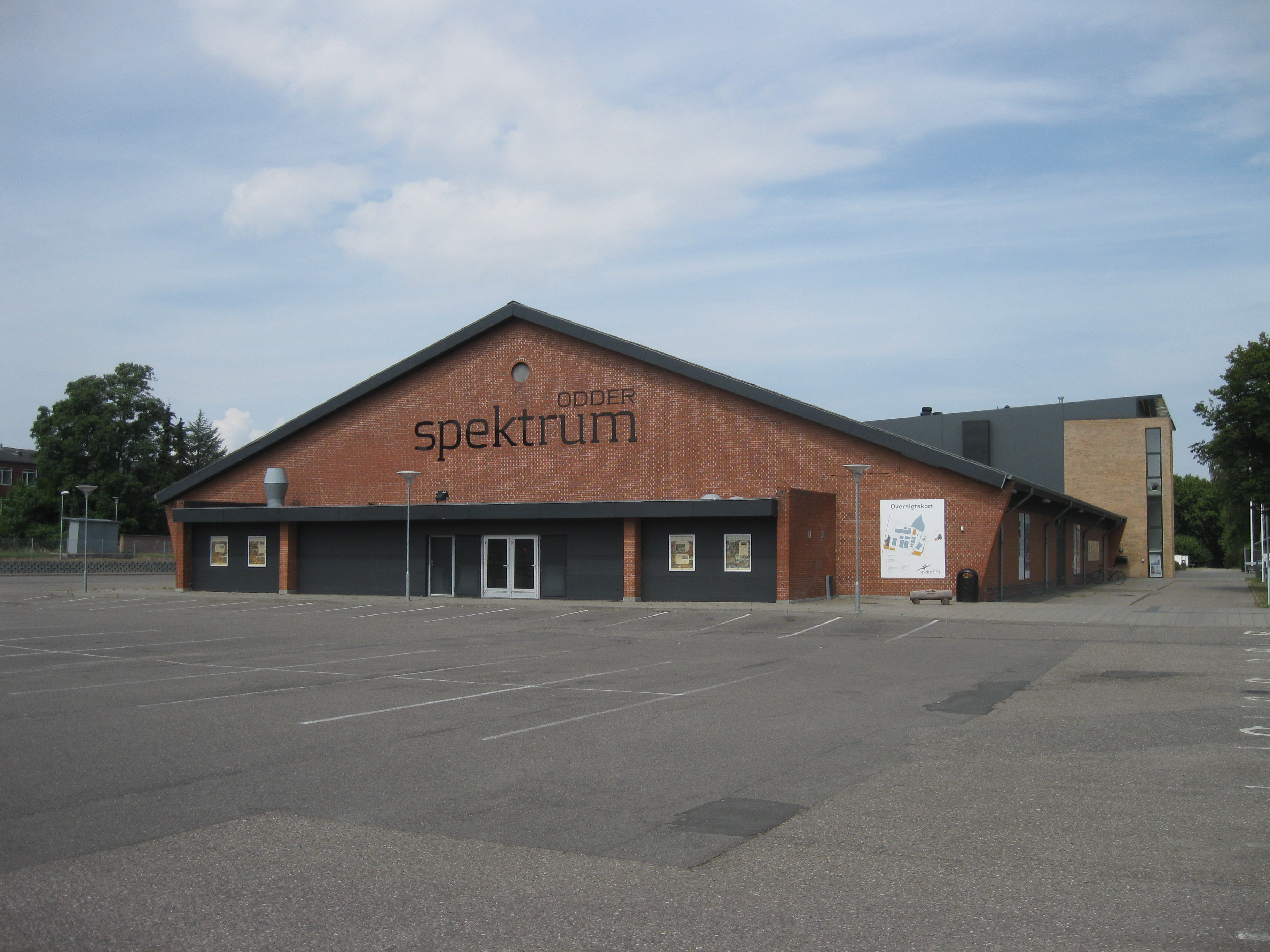 Odder Spektrum